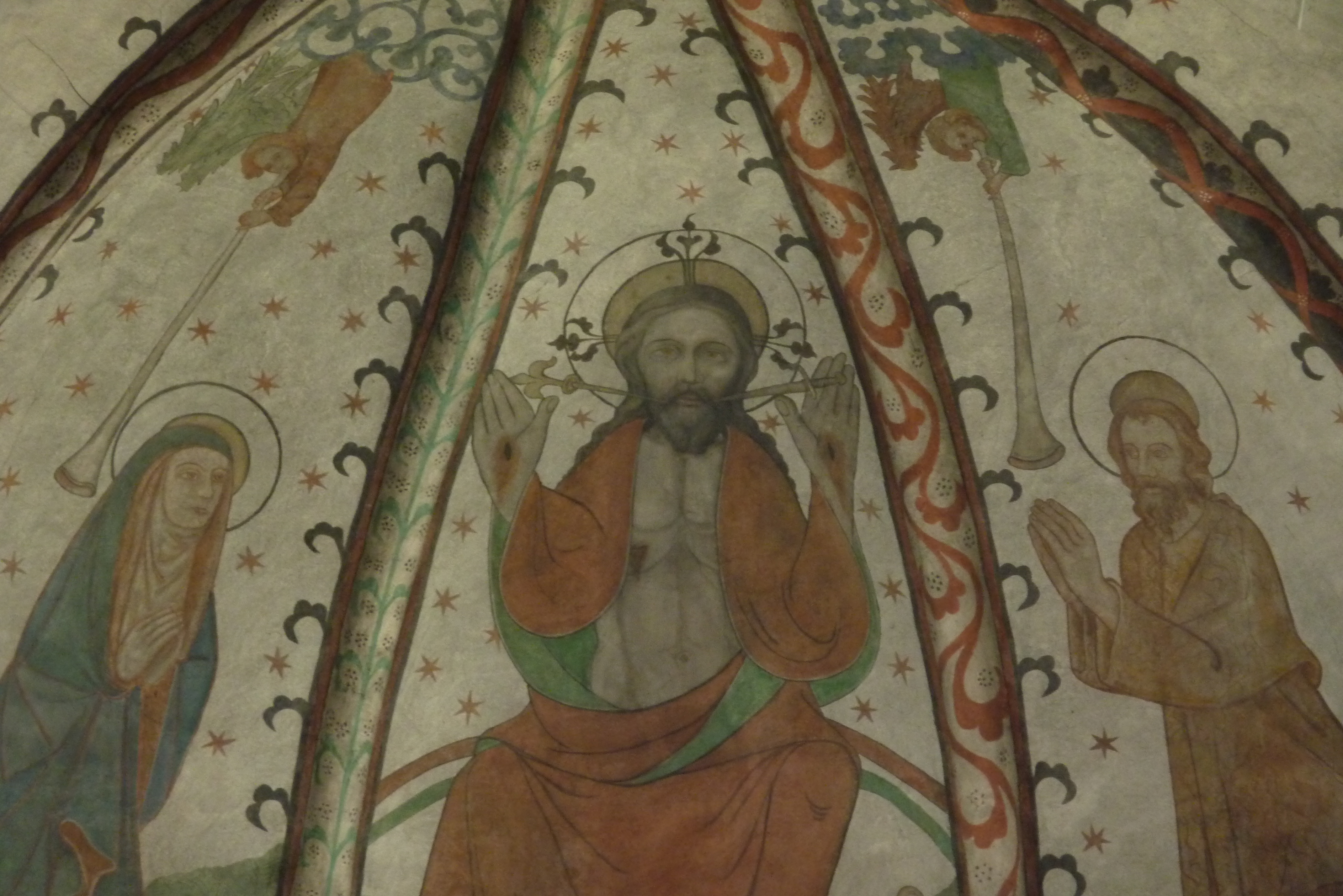 Oberbreisig, Katholische Pfarrkirche St. Viktor, Wandmalerei im Chor, Jüngstes Gericht